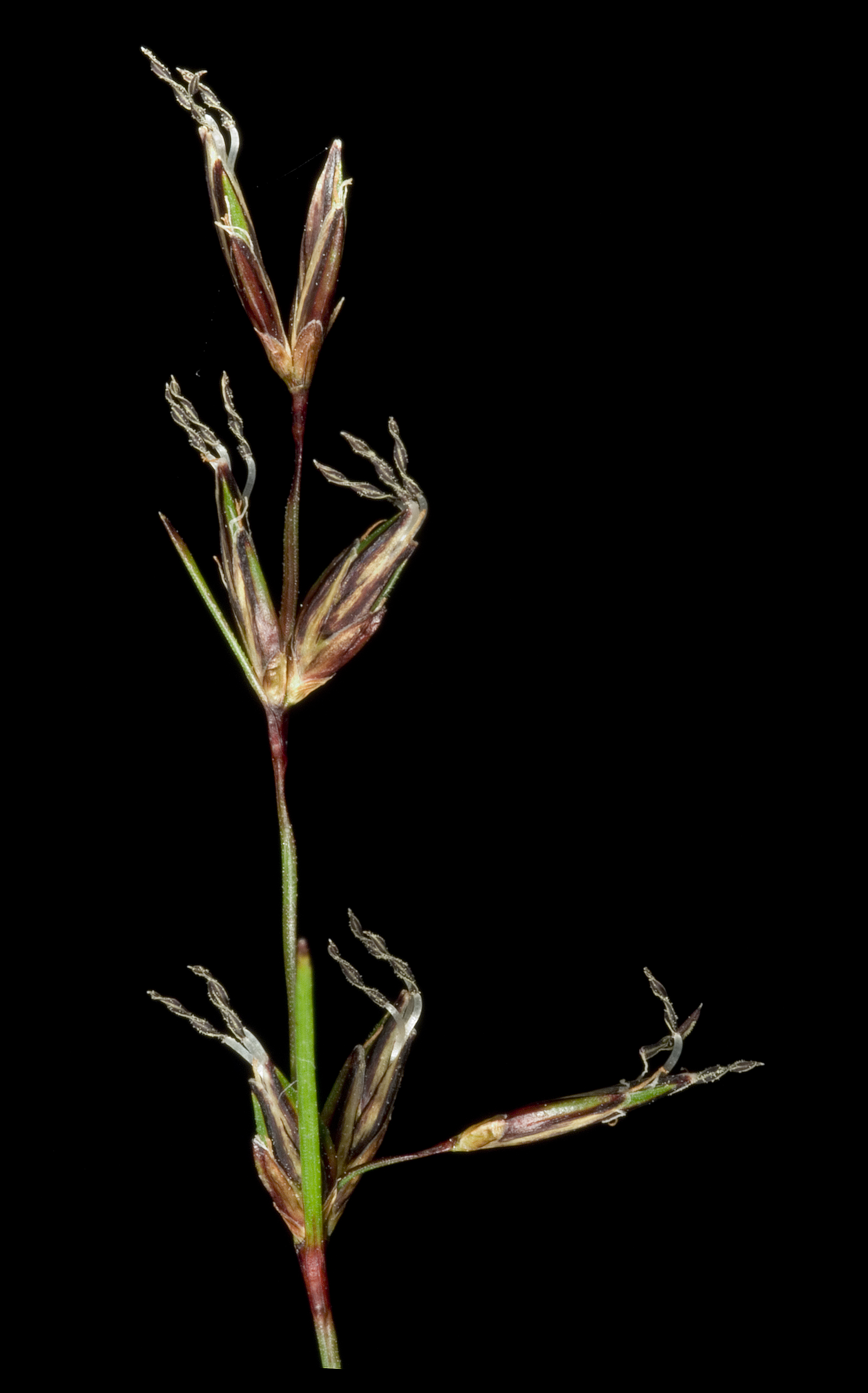 KRT3812